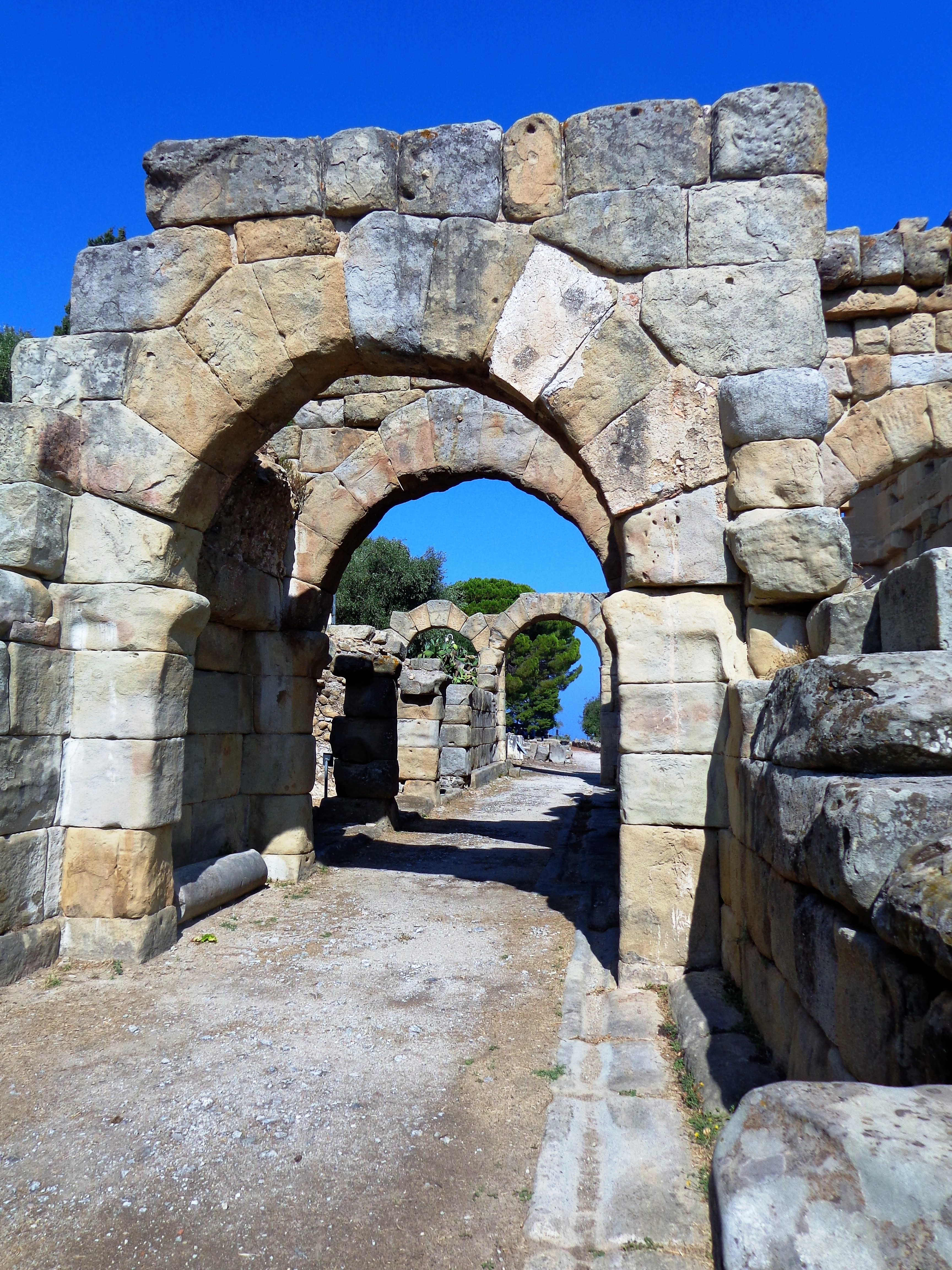 Gymnasium. 08 settembre 2012 (Escursione Tindari, Santuario e area archeologica). Scatto fotografico altresì presente negli album caricati sui profili personali di Facebook, Panoramio, Google, etc.